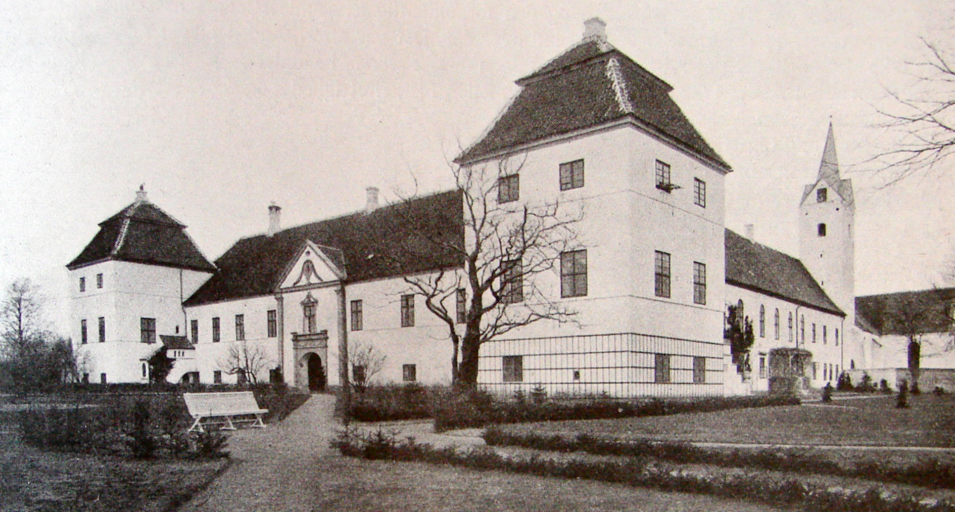 Dronninglund Slot set fra sydvest; Slottet ligger i den østlige del af Vendsyssel, i Dronninglund Sogn (indtil Kommunalreformen i 1970 lå det i Dronninglund Herred, Hjørring Amt); nu er det i Brønderslev Kommune og hører under Region Nordjylland.